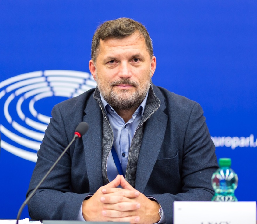 Nagy József képviselő felszólal